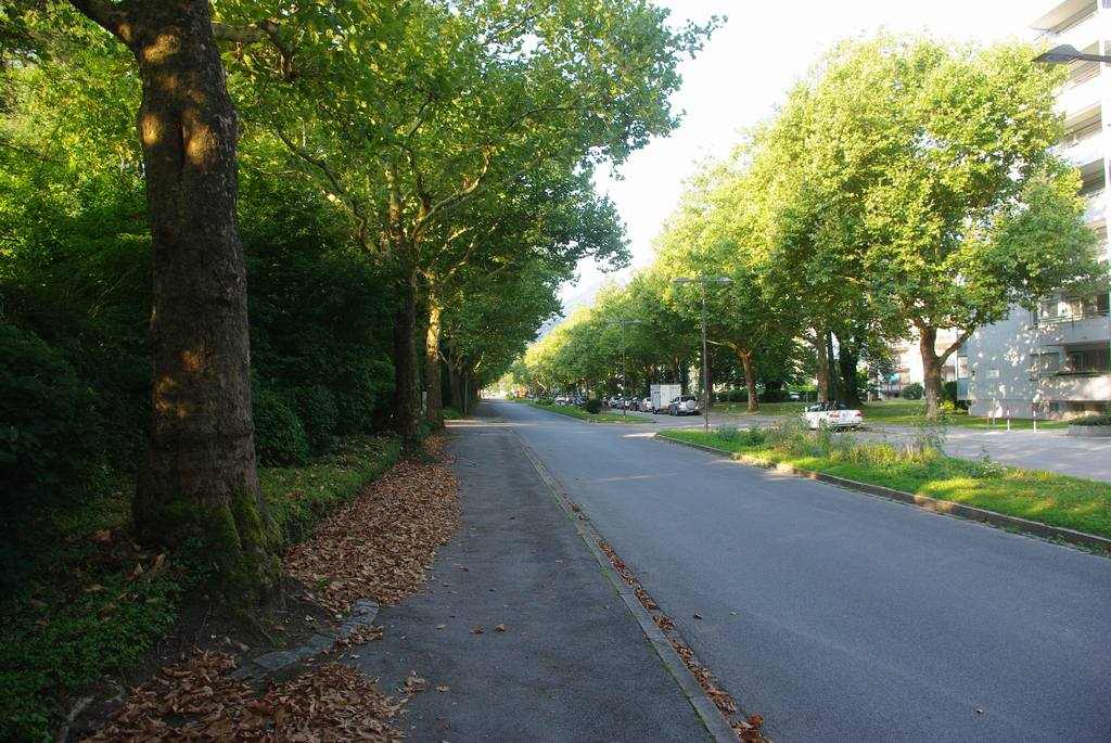 Münchner Allee in 83435 Bad Reichenhall